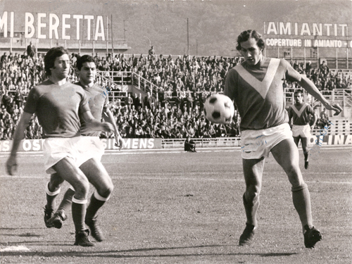 Brescia, stadio Mario Rigamonti, 17 ottobre 1971. AC Brescia vs AC Perugia (0-0), 4ª giornata del campionato di Serie B 1971-72. Il bresciano Giorgio Fanti (a destra), palla al piede, viene affrontato dai perugini Carlo Volpi e Bruno Mazzia (a sinistra), entrambi ex delle rondinelle.